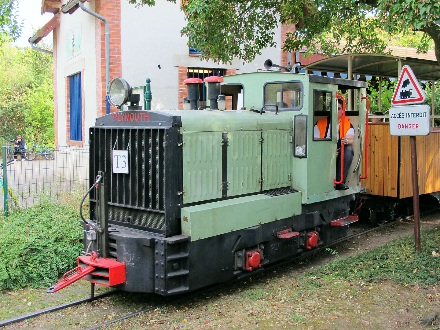 Le locotracteur Plymouth N°10 du Chemin de fer des Chanteraines le 16 septembre 2012.